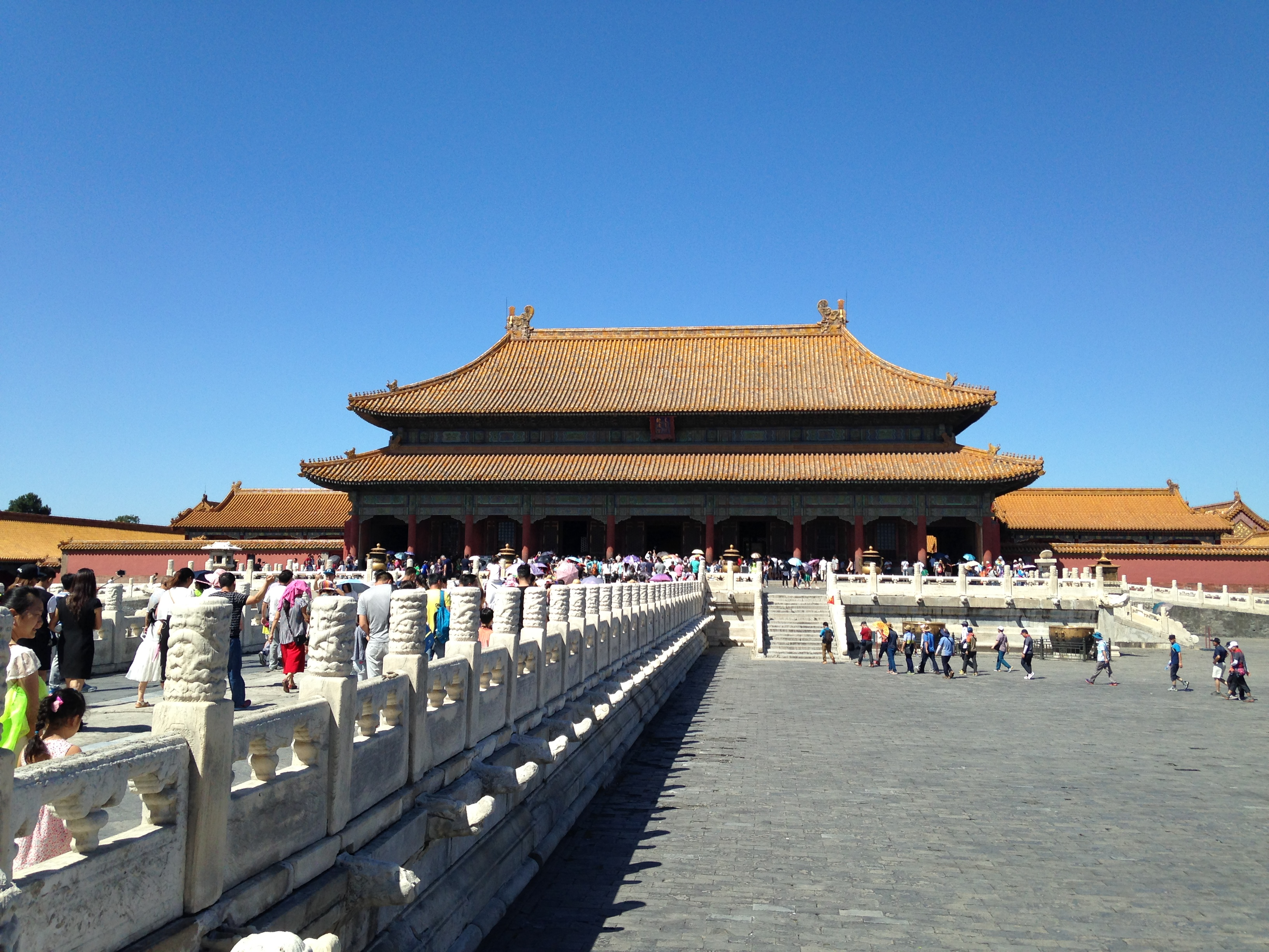 紫禁城・乾清宮